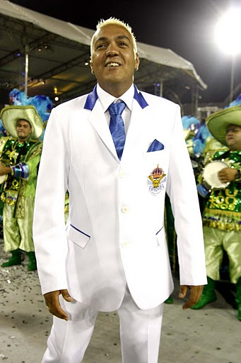 Cantor Belo no carnaval 2010.